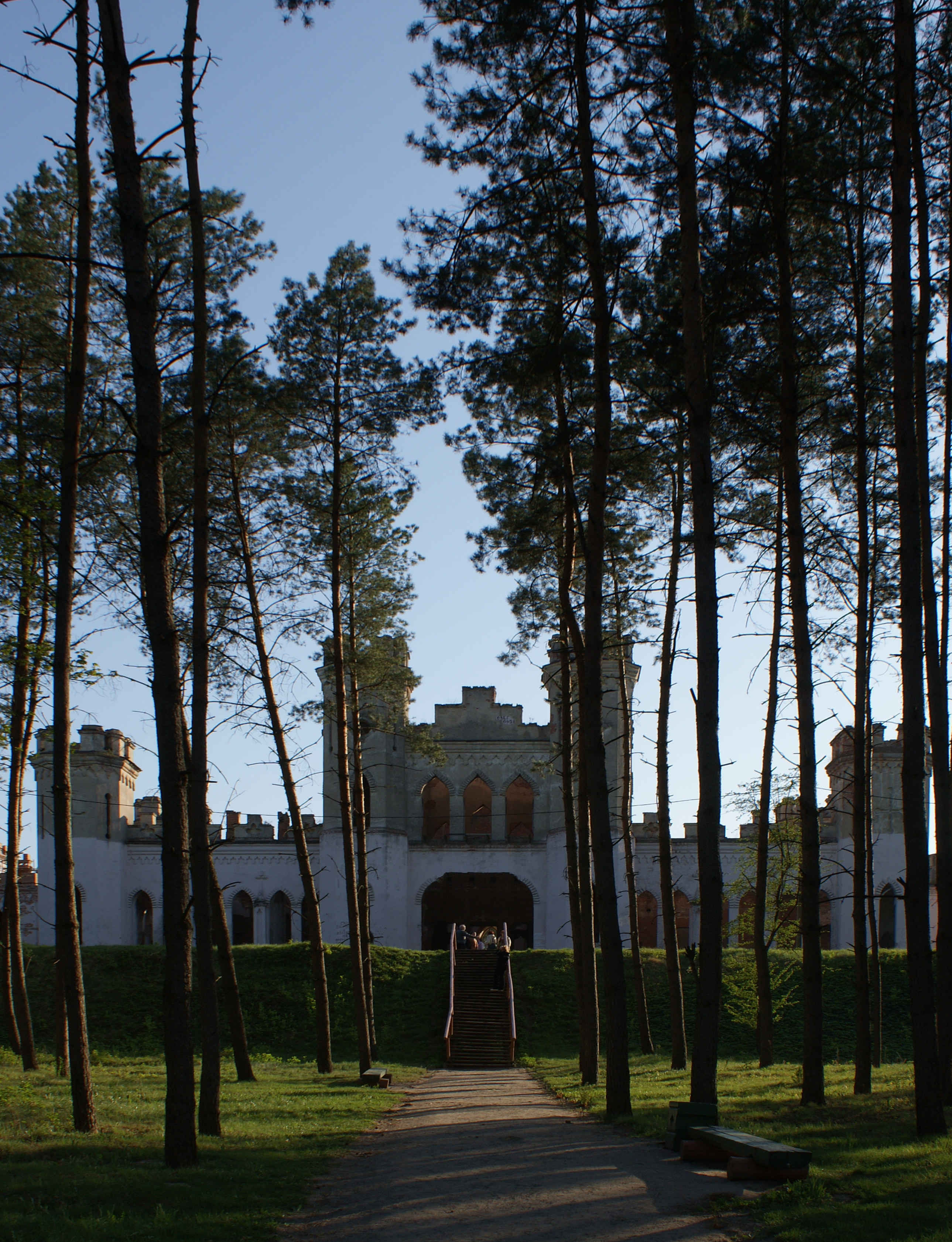 Дворец в Коссово